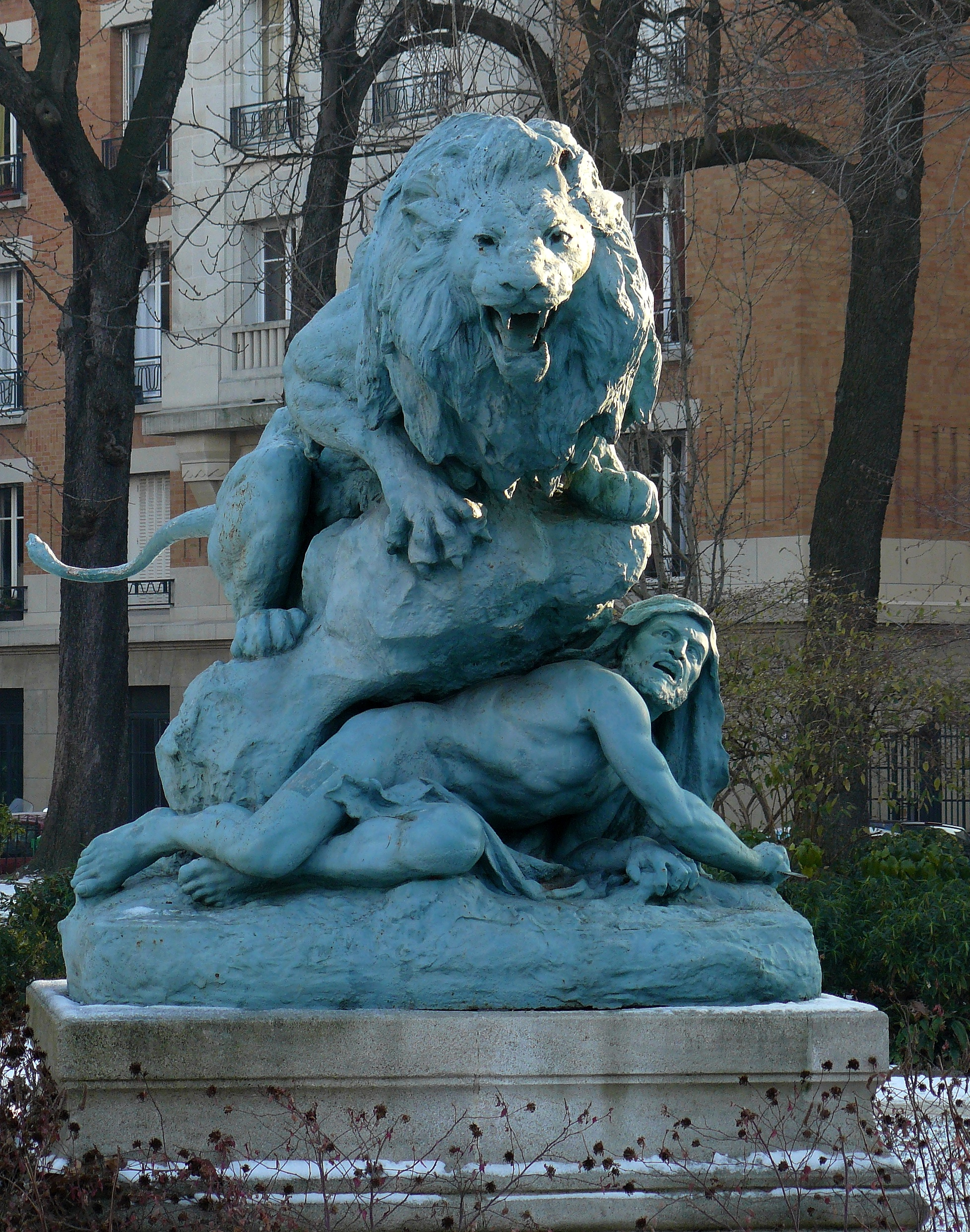 Henri Amédée Fouques (français, 1857-1903): Drame au désert - Fonte de fer (1891) installé dans le Square Cambronne, XVème arrondissement de Paris.